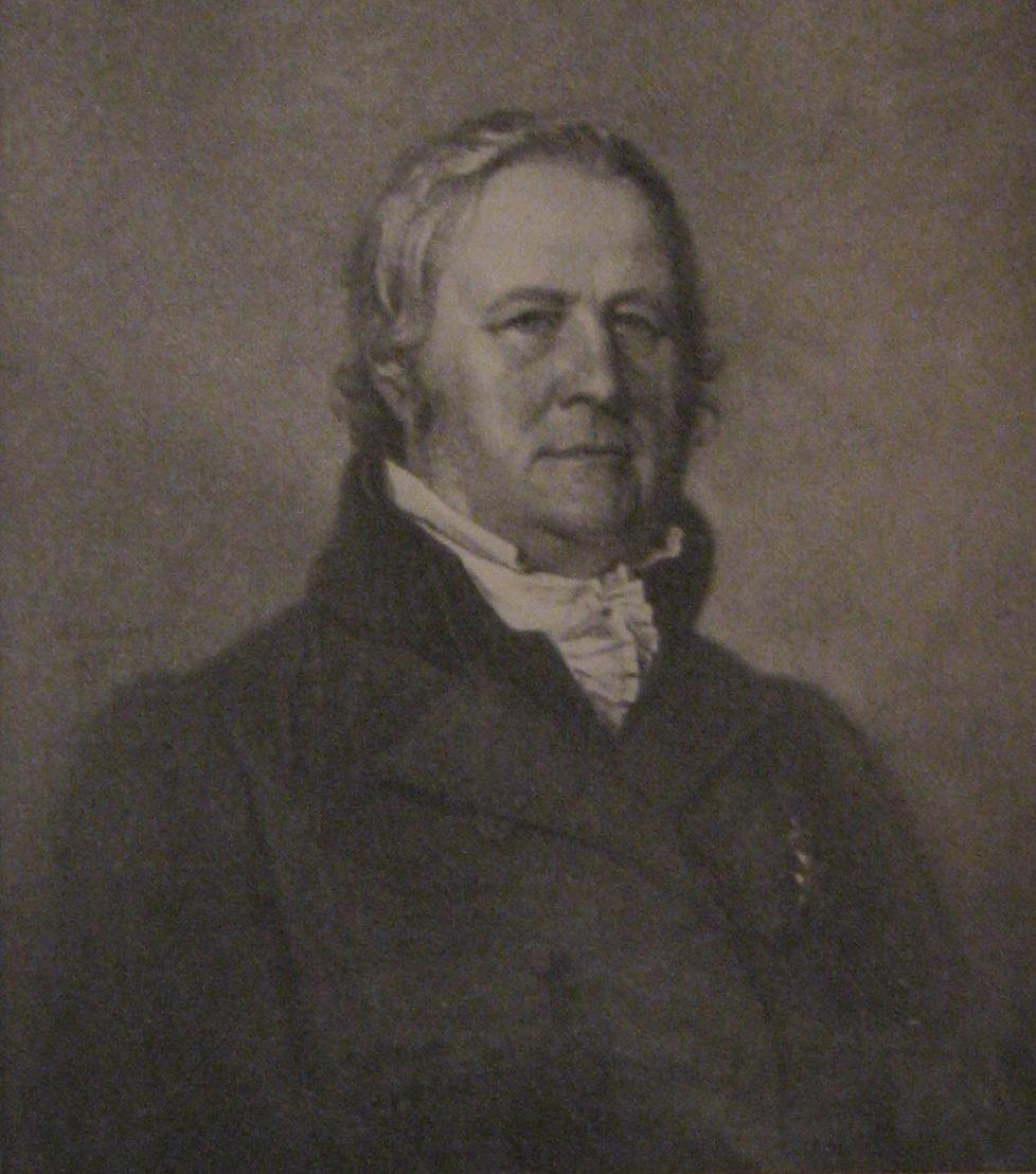 Porträtt av Lars Georg Rabenius, målat av J. G. Sandberg 1834